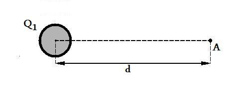 Noktasal Q yüklü bir cismin kendinden d kadar uzaklıkta bulunan bir noktada oluşturduğu elektrik potansiyelinin değerini veren bağıntının yanında yer alan şekildir.